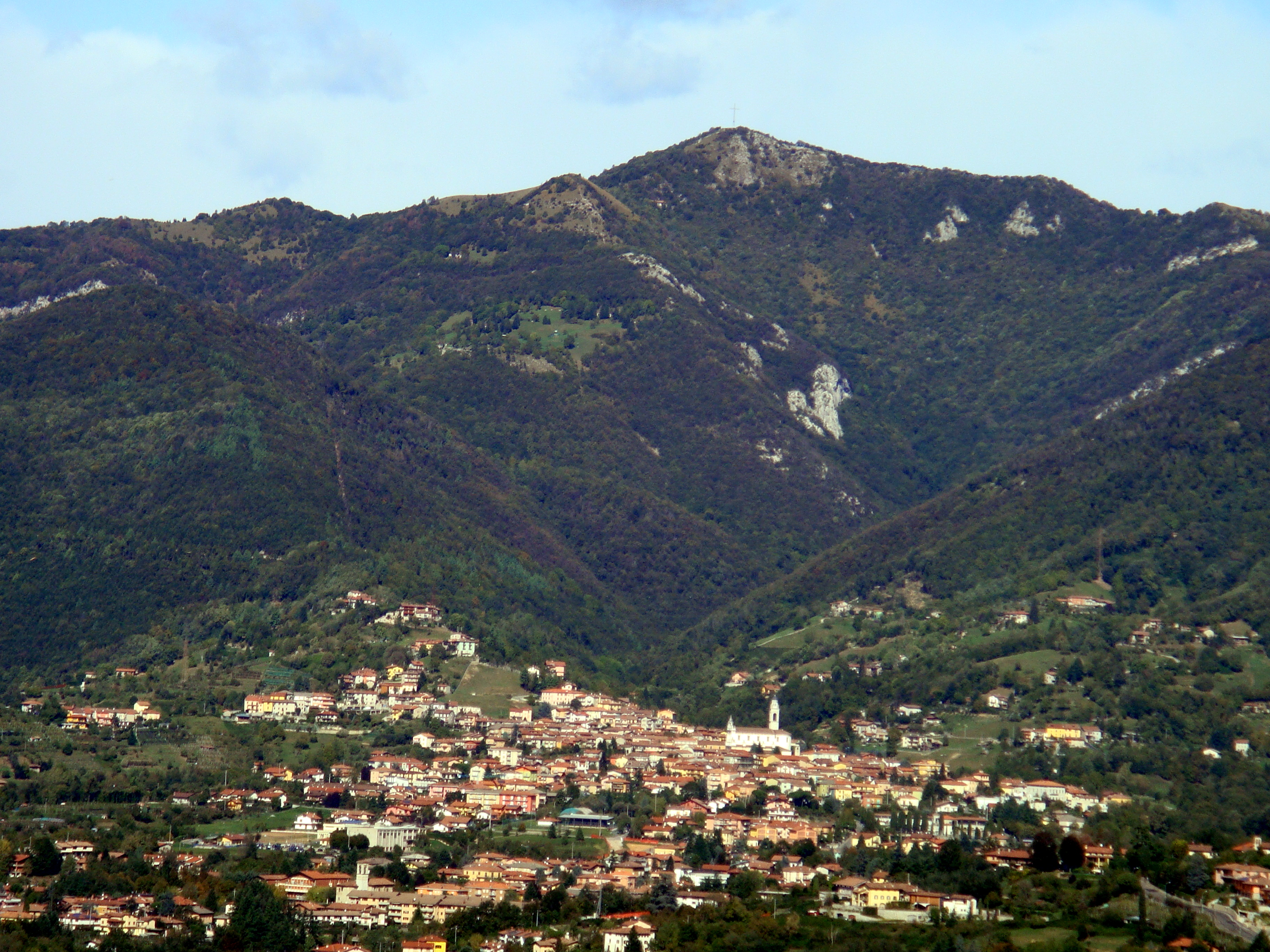 Panorama di Sorisole (Bergamo)